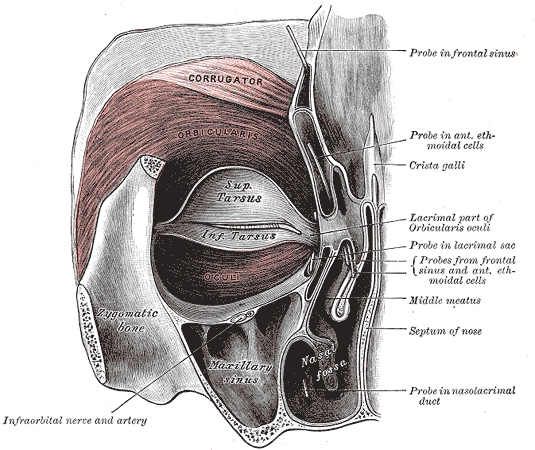 Frontalschnitt durch den Kopf, Sicht von dorsal. Darstellung der Orbita nach Entfernung des Corpus adiposum, Glandula lacrimalis, des Auges und seiner Muskeln. Sicht auf Mm. Tarsales inf. et sup., sowie M. Orbicularis. Darstellung des Sinus maxillaris und frontalis, sowie der Nasenhöhle und Cellulae ethmoidales sup. Sondengängige Verbindungen der Nasenhöhlen durch Hiatus semilunaris. Ebenfalls gezeigt, der Ductus nasolacrimalis.